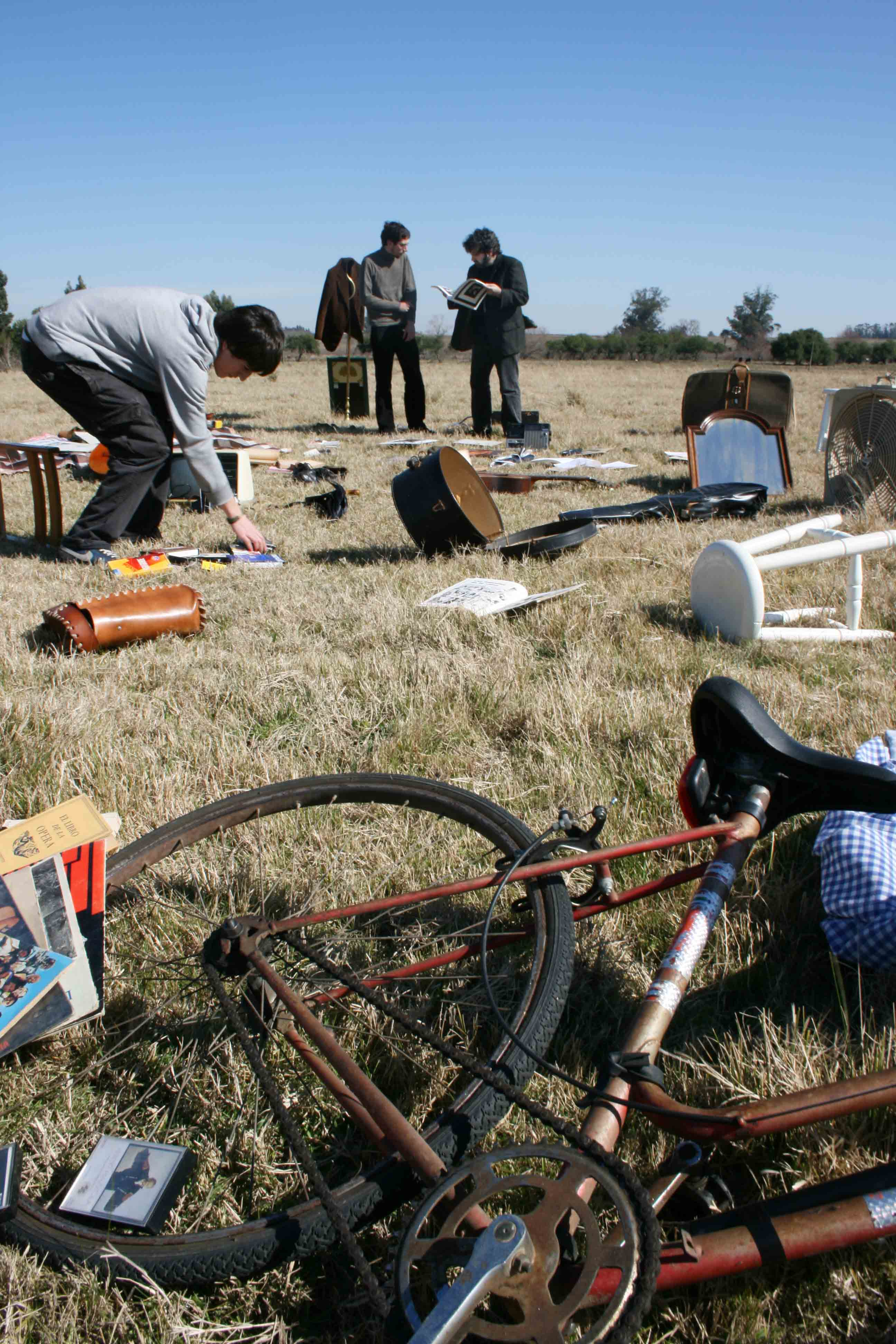 Fotografía del cantante uruguayo Gastón Rodríguez Aroztegui en la grabación del videoclip "Canción del hombre de Ningúnlugar". Fotografía tomada por Damián Vicente.